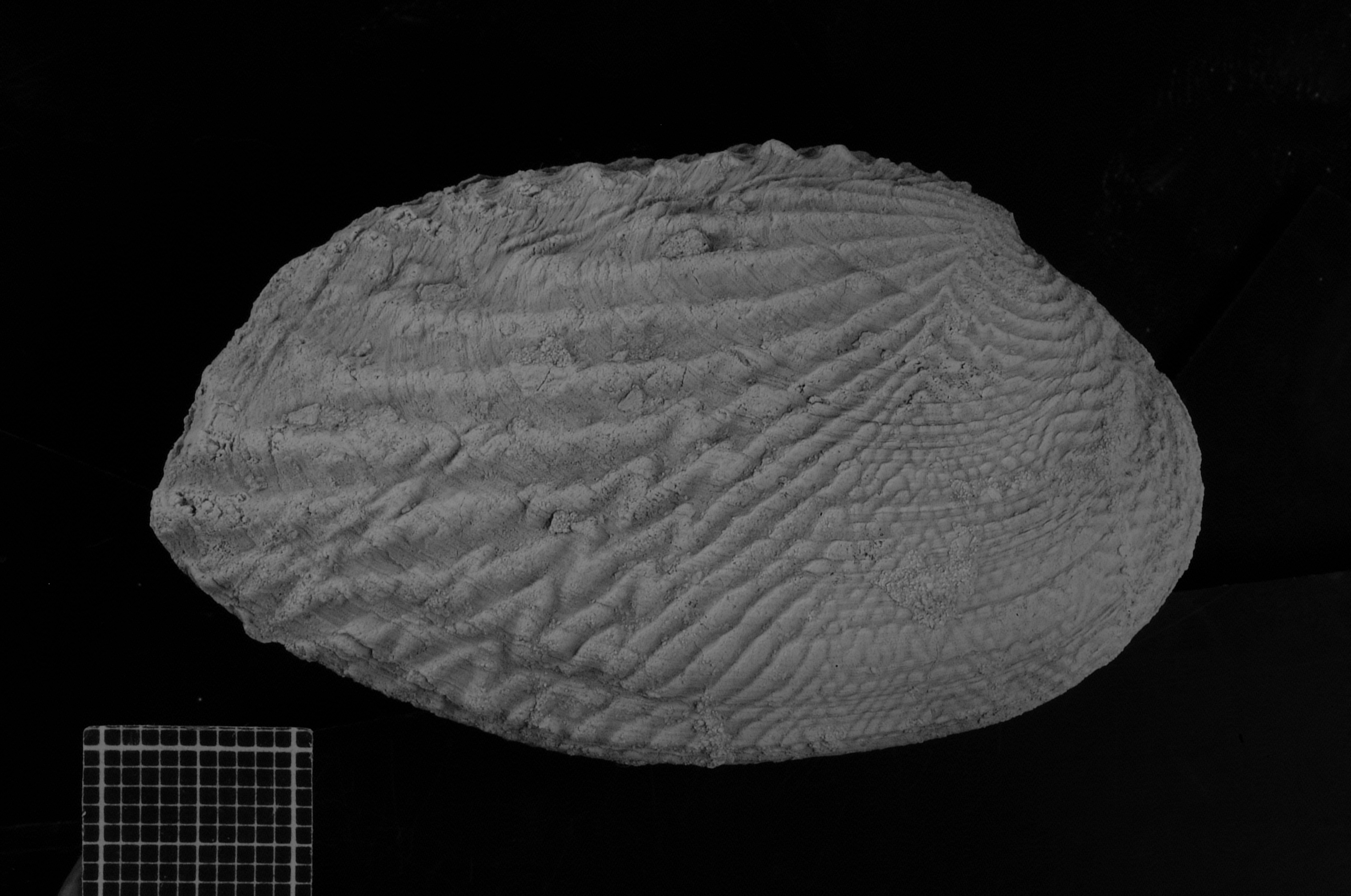 Vista derecha de un ejemplar articulado del bivalvo marino fósil Ptuchomya koeneni. Formación Agrio, Cuenca Neuquina, Argentina